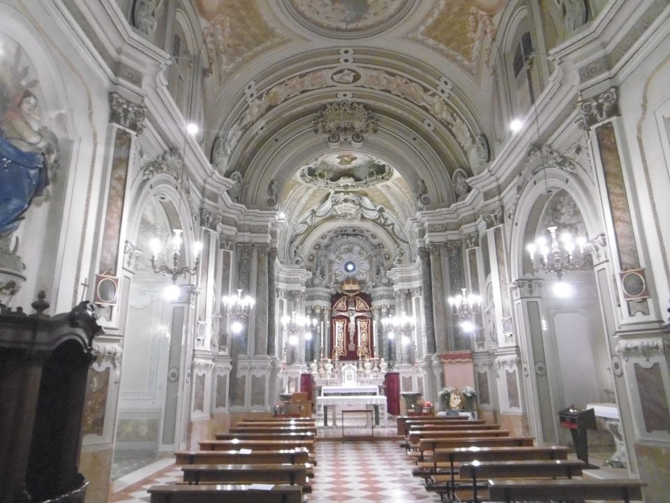 Santuario del Santissimo Crocifisso di San Luca sito a Ferrara, via Fabbri 414